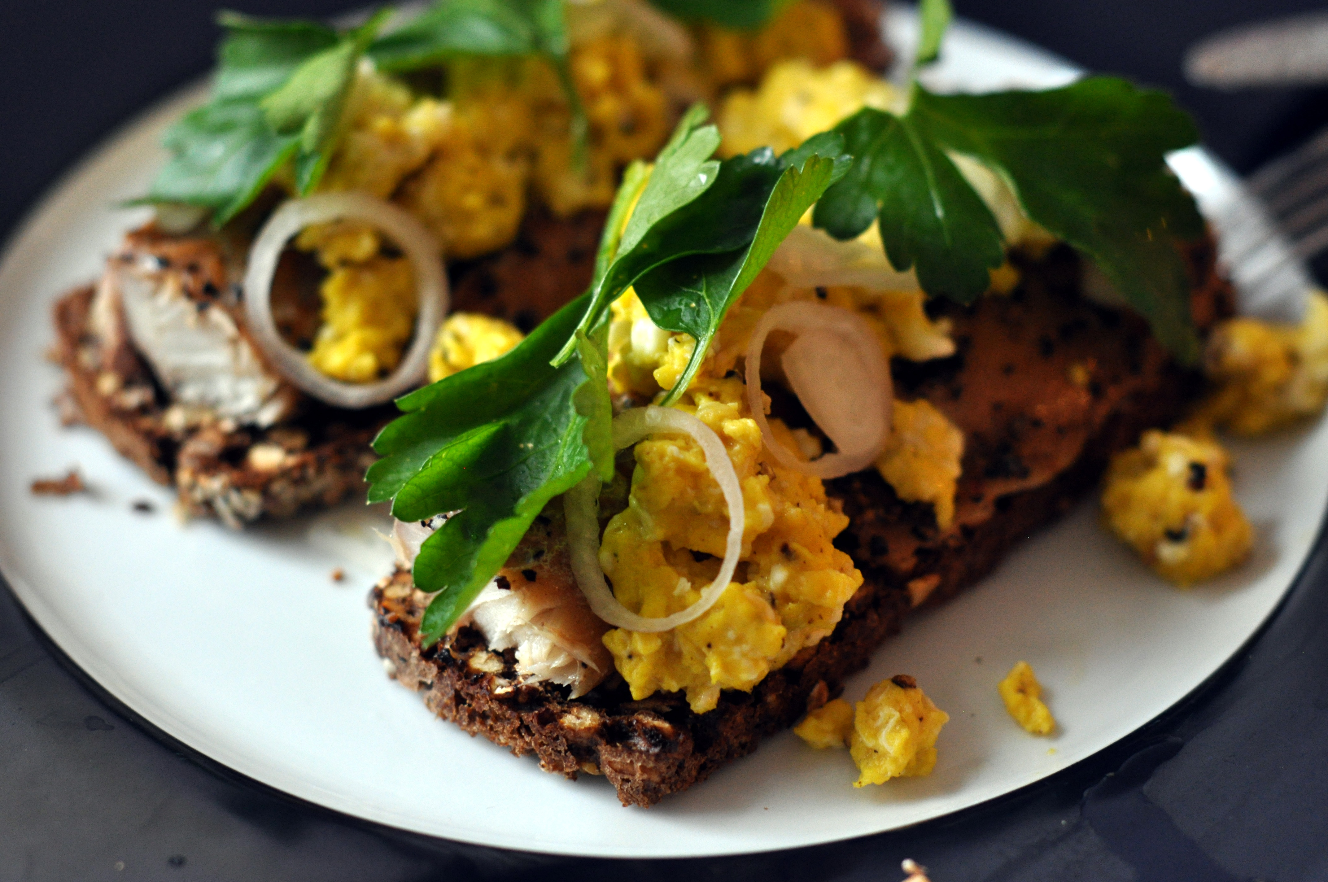 Ristet rugbrød med røget pebermakrel og røræg